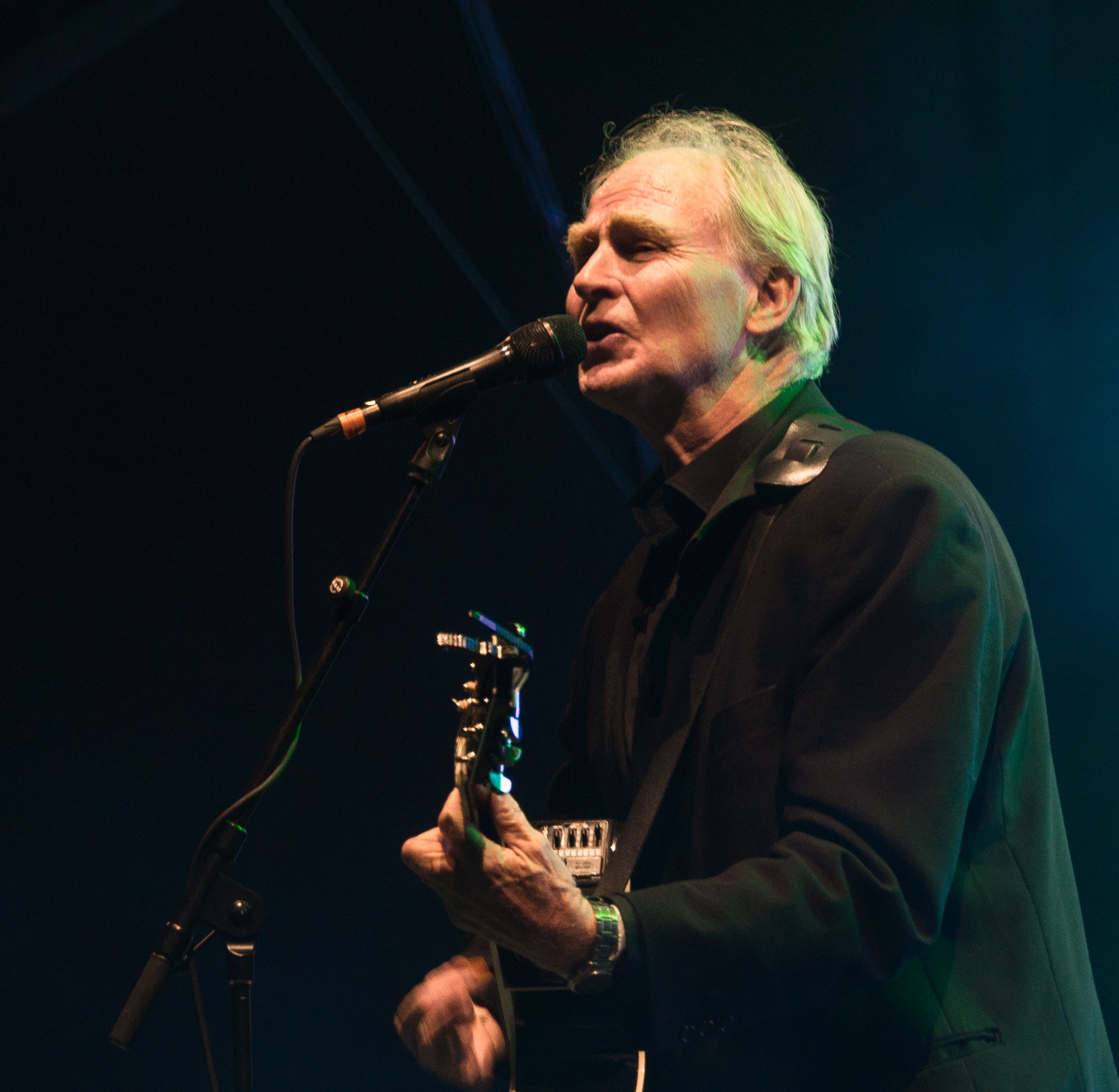 Anders Falk i Adolphson & Falk uppträder på Gustav Adolfs torg på Stockholms Kulturfestival 2019.